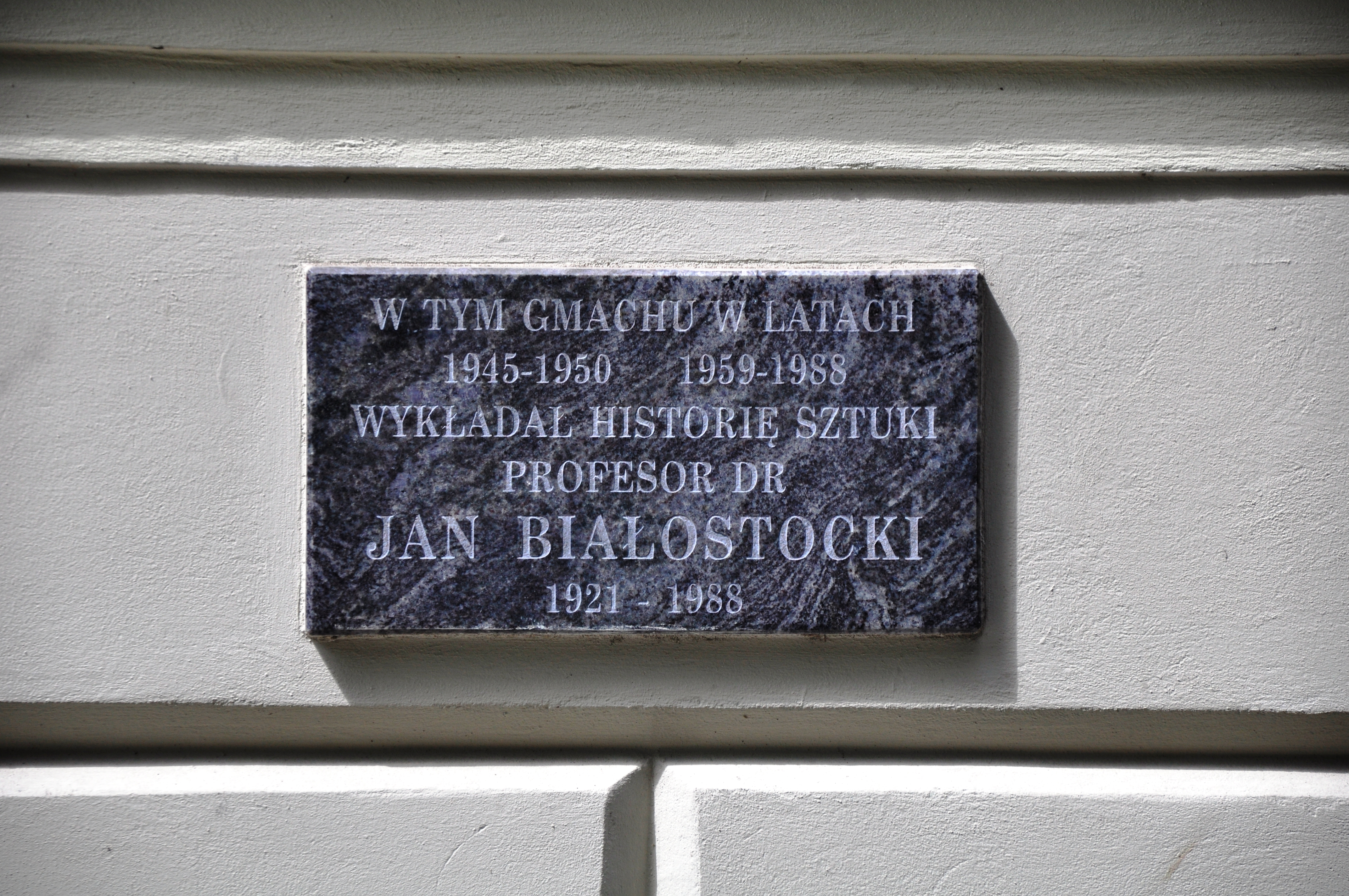 Warschau, Campus der Universität Warschau